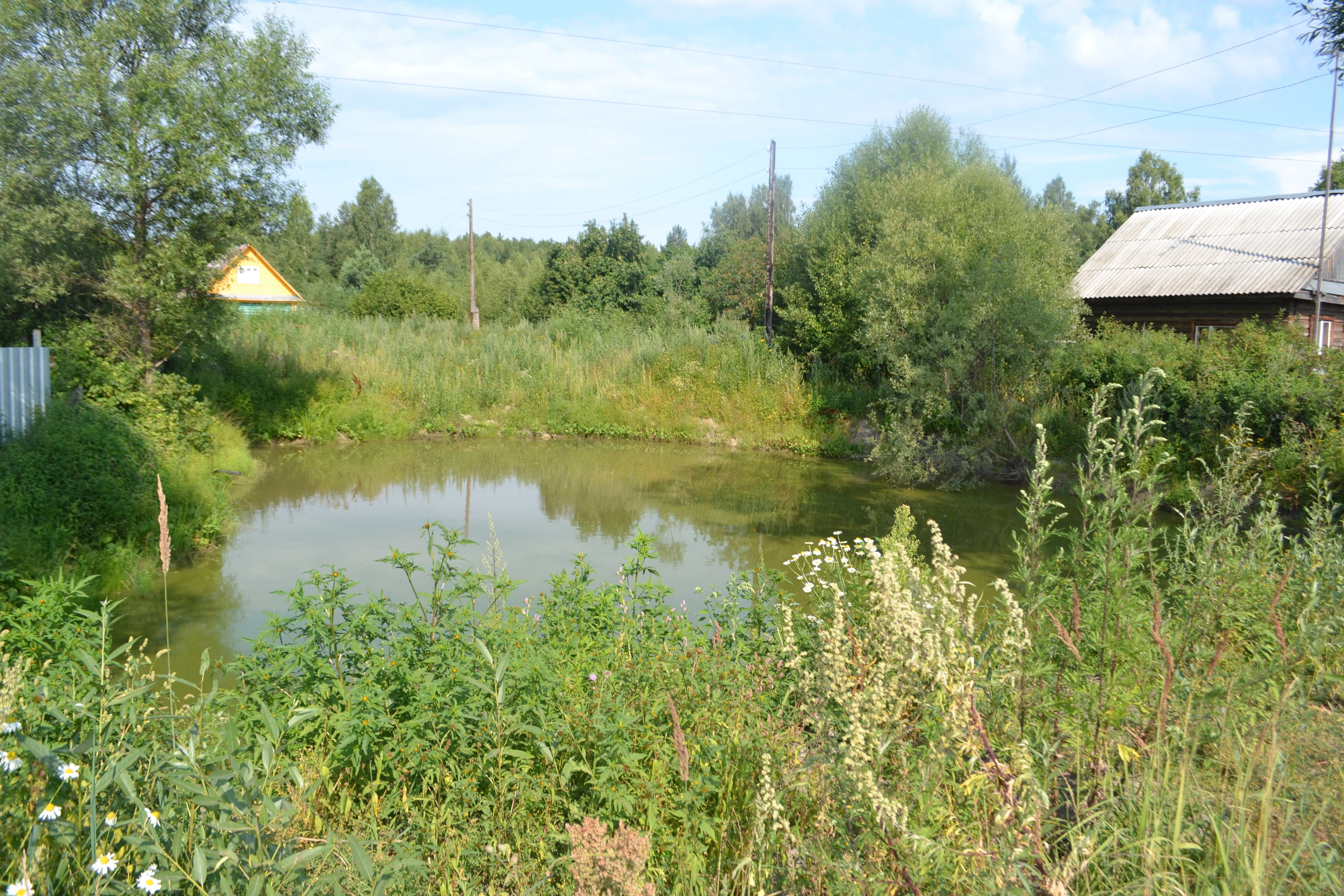 Пруд в деревне Ловчиково (Шатурский район)